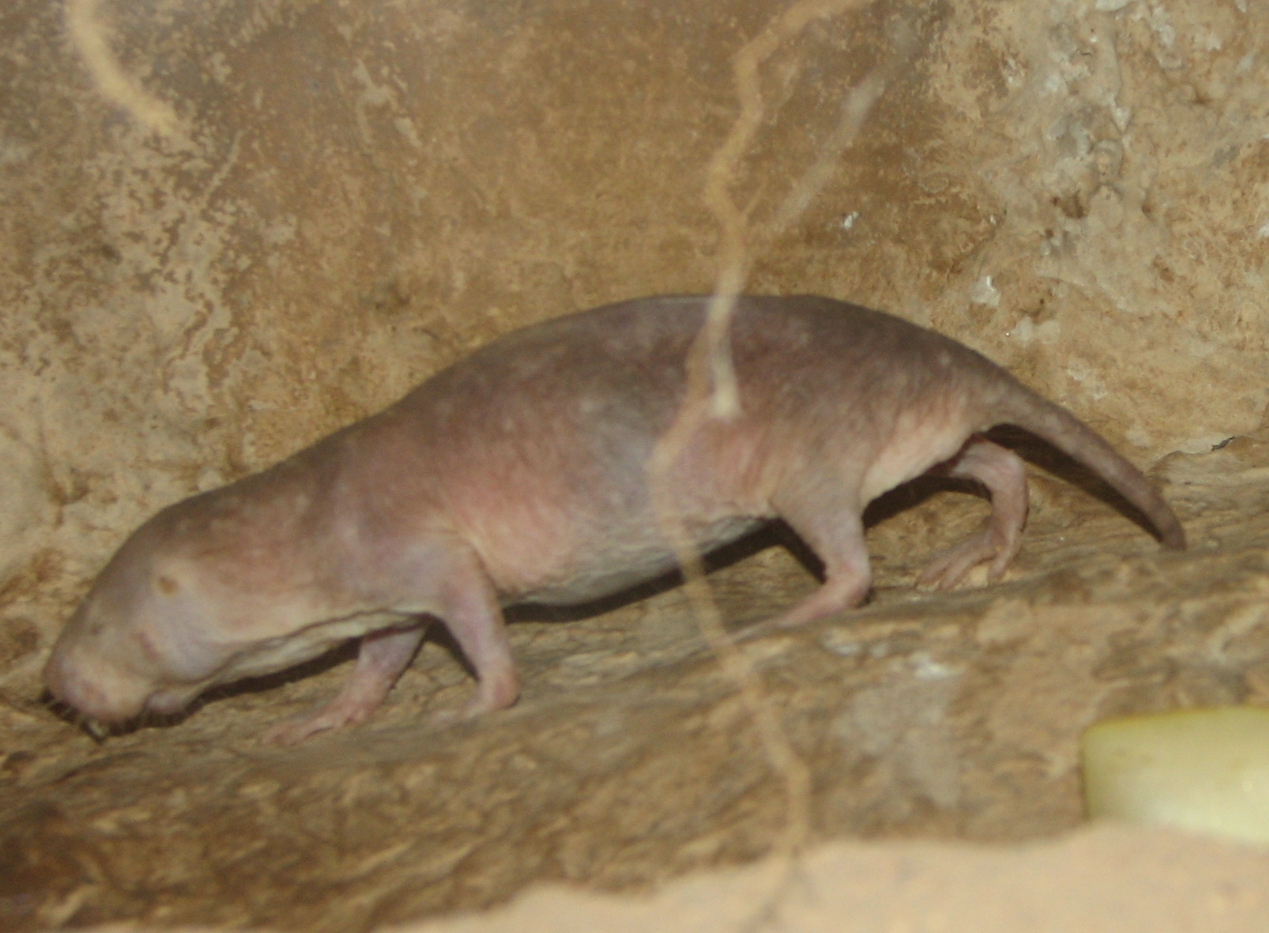 Naked Molerat